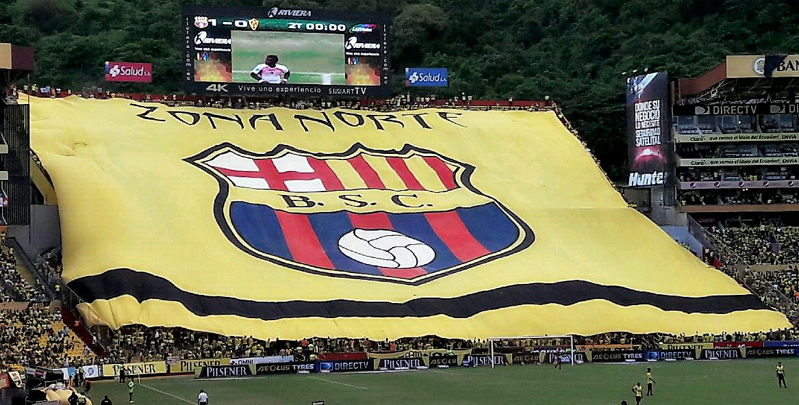 Zona Norte (Barcelona - Fuerza Amarilla) 23 de abril de 2017